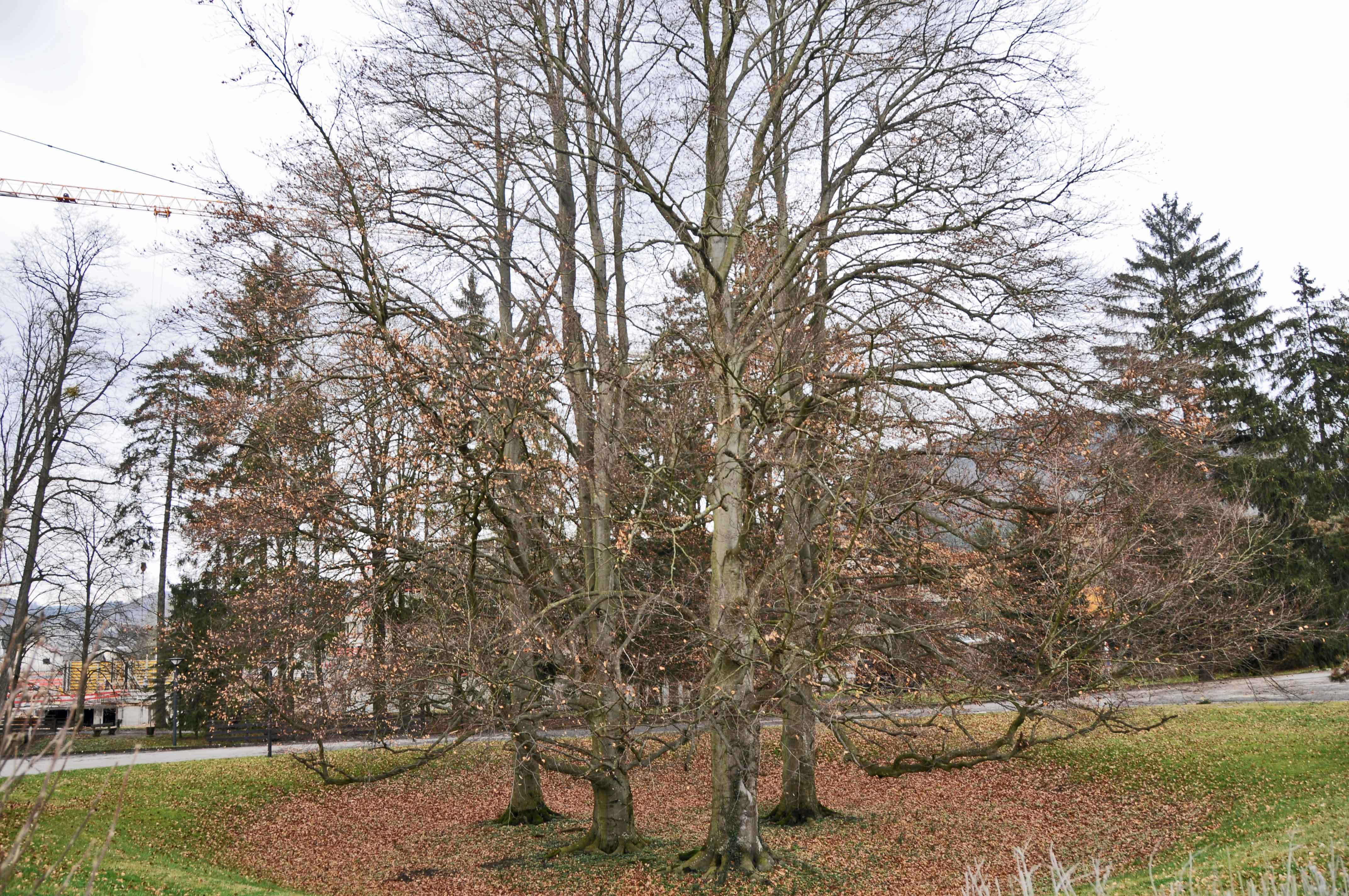 Bluttbuchen am Park zu Bouferdeng.